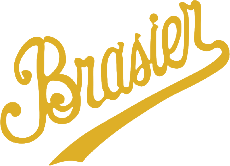 Logo du fabricant de voitures Brasier